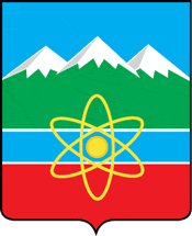 Trjokhgornyjs byvåpen.